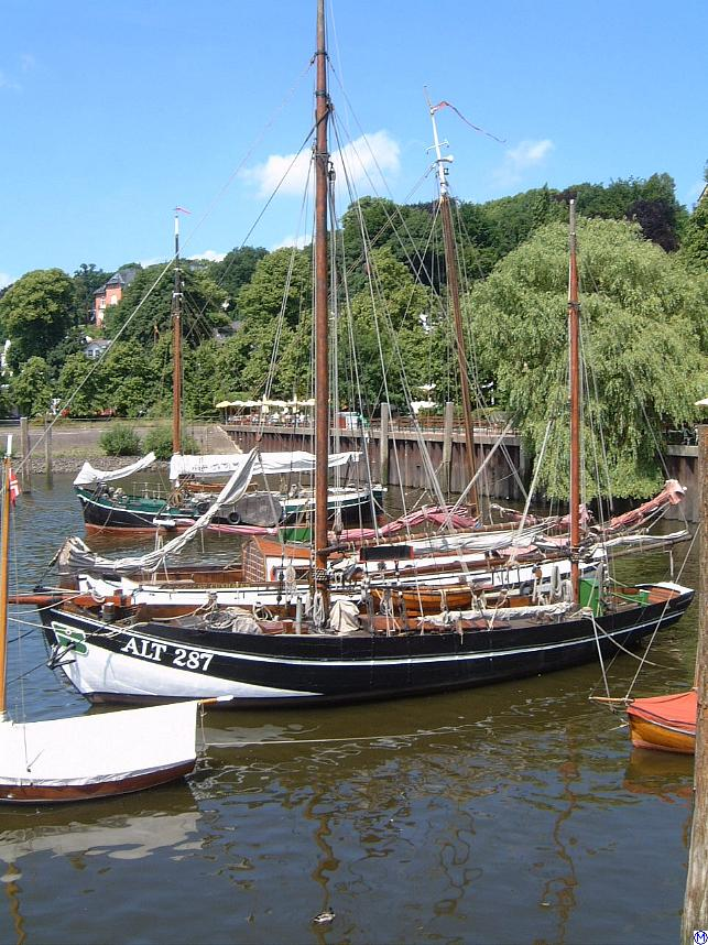 Elbkutter im Museumshafen Oevelgönne